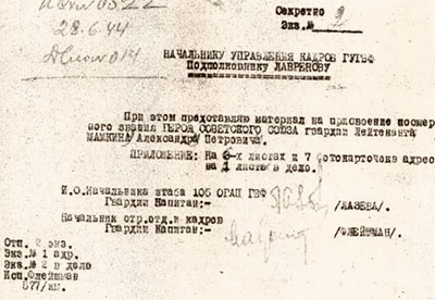 Уважаемые администраторы, я считаю это представление на звание героя более важным документом, чем один из наградных листов (его можно и убрать, достаточно перечень наград). Это представление необходимо, чтобы ссылаться на него для присвоения звания героя герою.